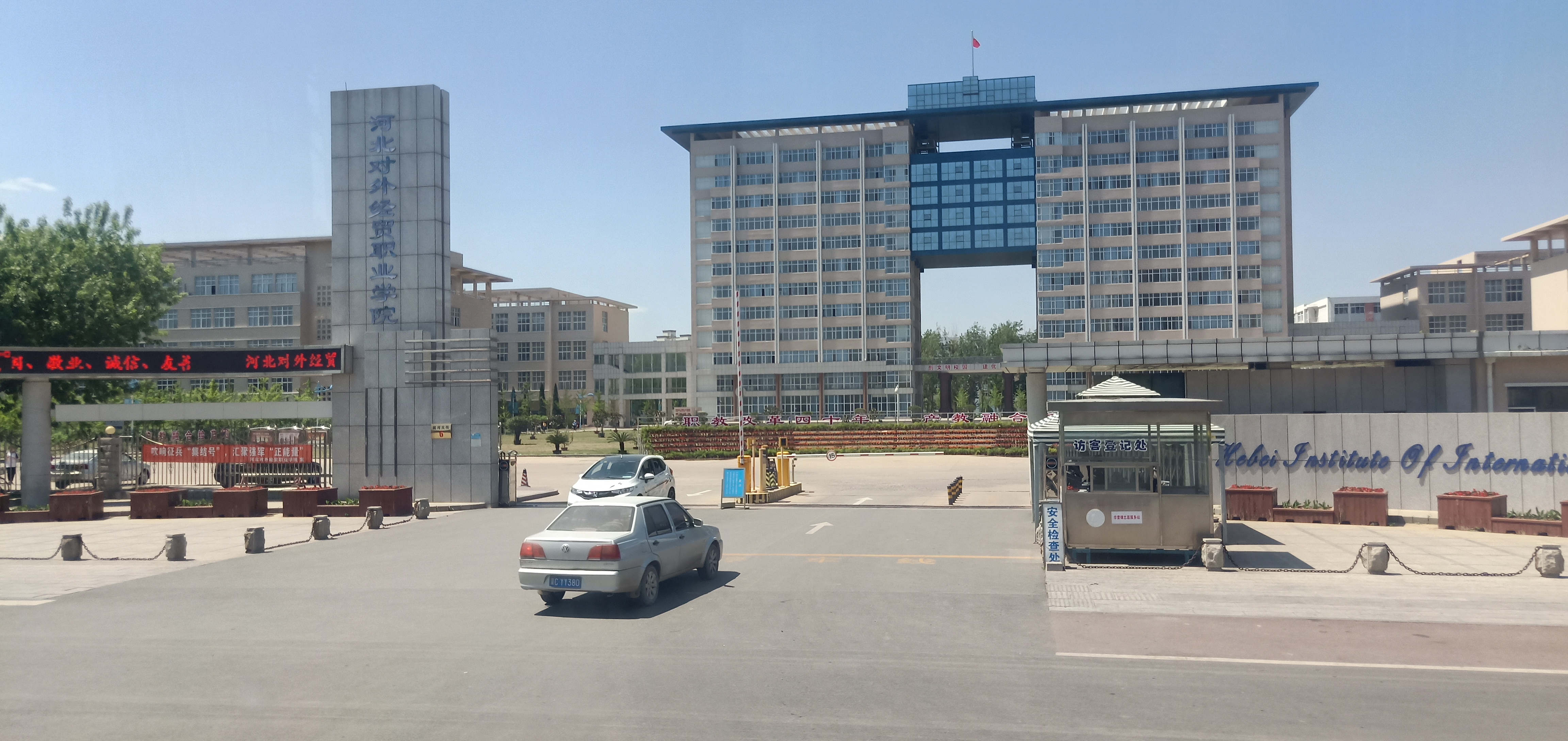 粵語: 河北對外經貿職業學院